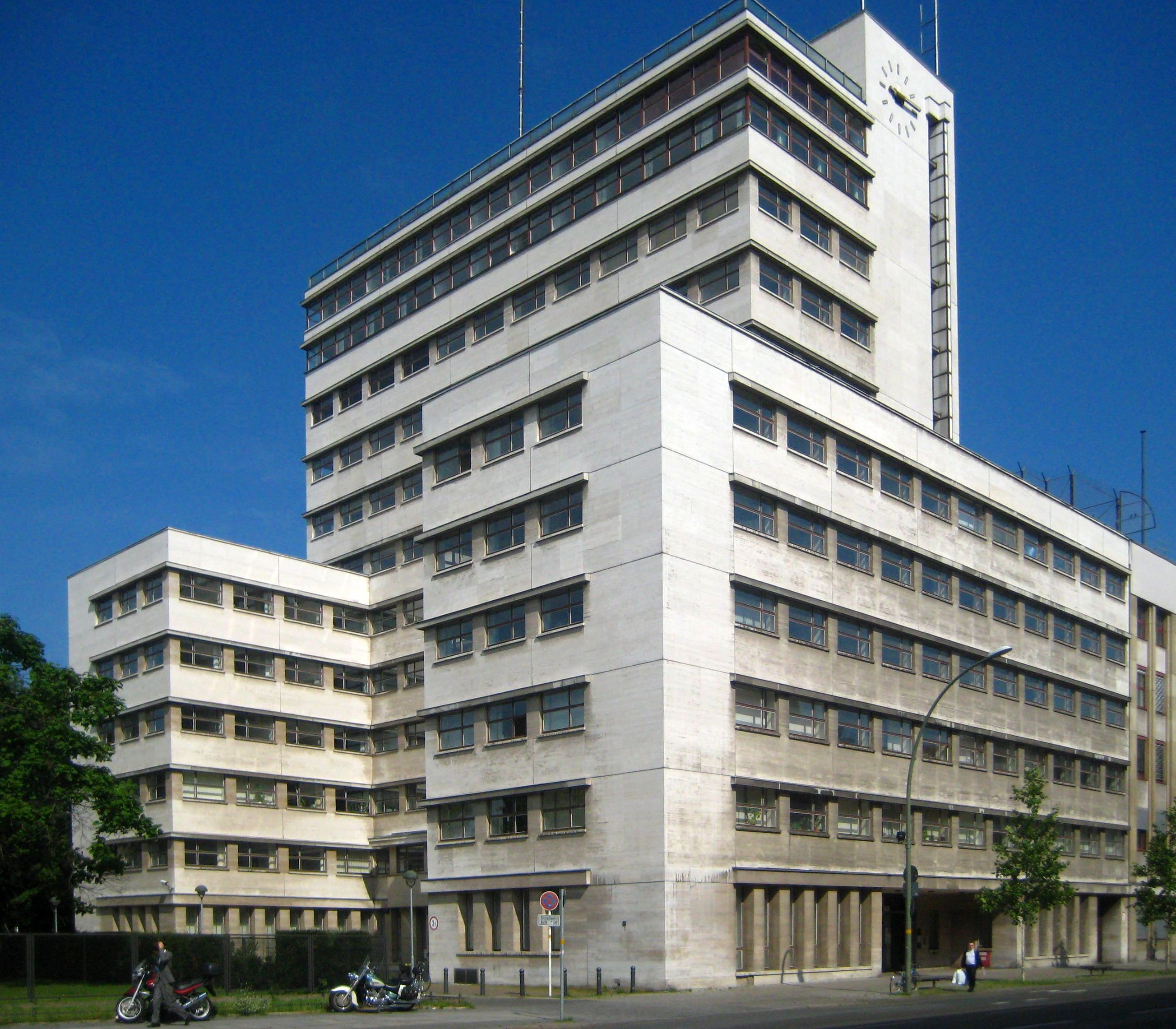 Das Kathreiner-Haus in der Potsdamer Straße 186 in Berlin-Schöneberg, erbaut 1928-1930 nach einem Entwurf des Architekten Bruno Paul für die Kathreiners Malzkaffee Fabriken GmbH. Das moderne Gebäude im Stil der Neuen Sachlichkeit hat einen doppel-T-förmigen Grundriss. Die Flügelbauten des Stahlskelettbaus besitzen jeweils 6 Etagen, der Mitteltrakt 12 Etagen. Die Fassade ist mit Travertin verkleidet. Der Haupteingang des Gebäudes liegt nicht an der Potsdamer Straße, sondern ist auf die Königskolonnaden im benachbarten Kleistpark ausgerichtet.